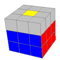 To nedereste lag lavet på en Rubik's Cube